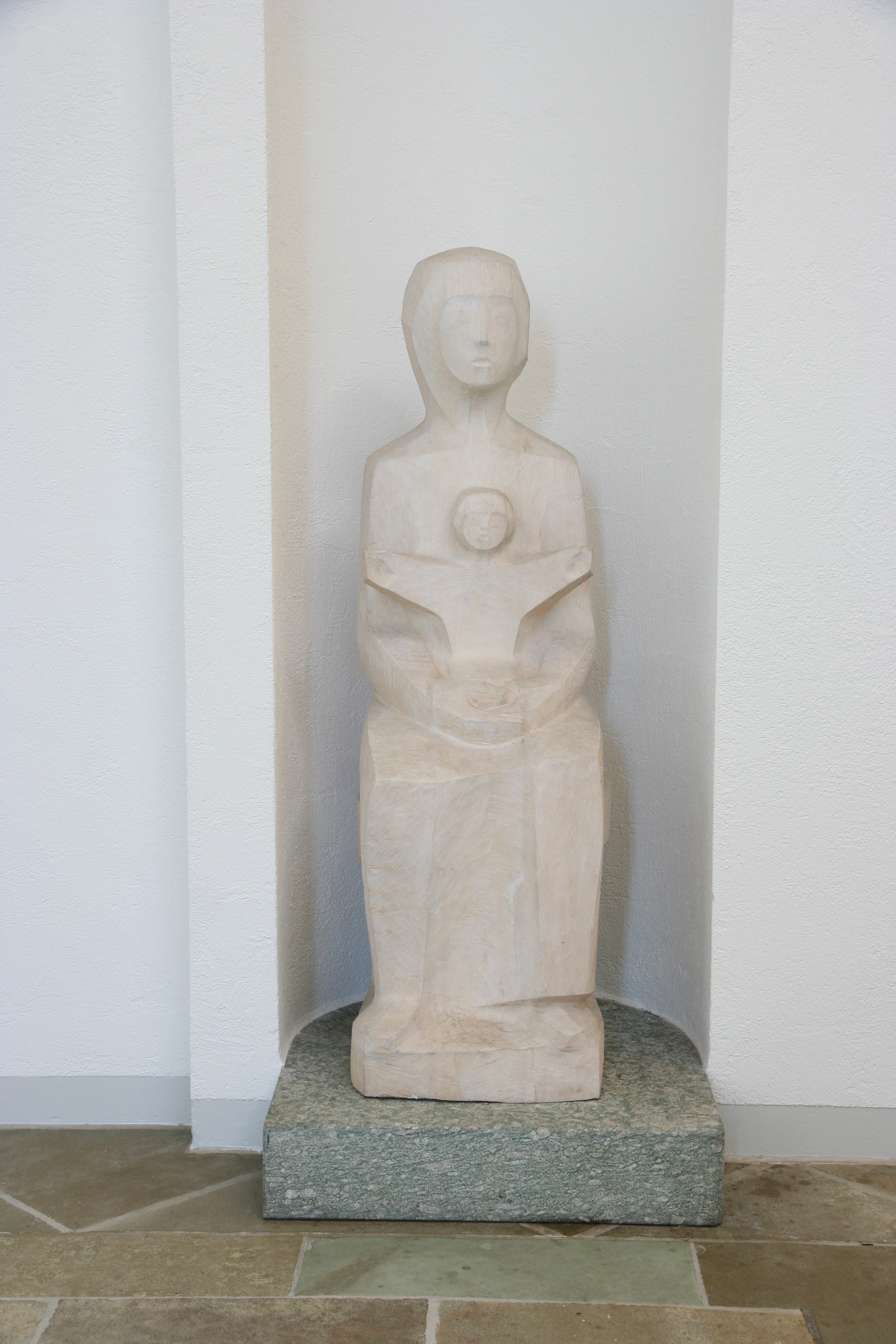 Römisch-katholische Pfarrkirche Maria Magdalena Rafz, Gestaltung von Alois Spichtig